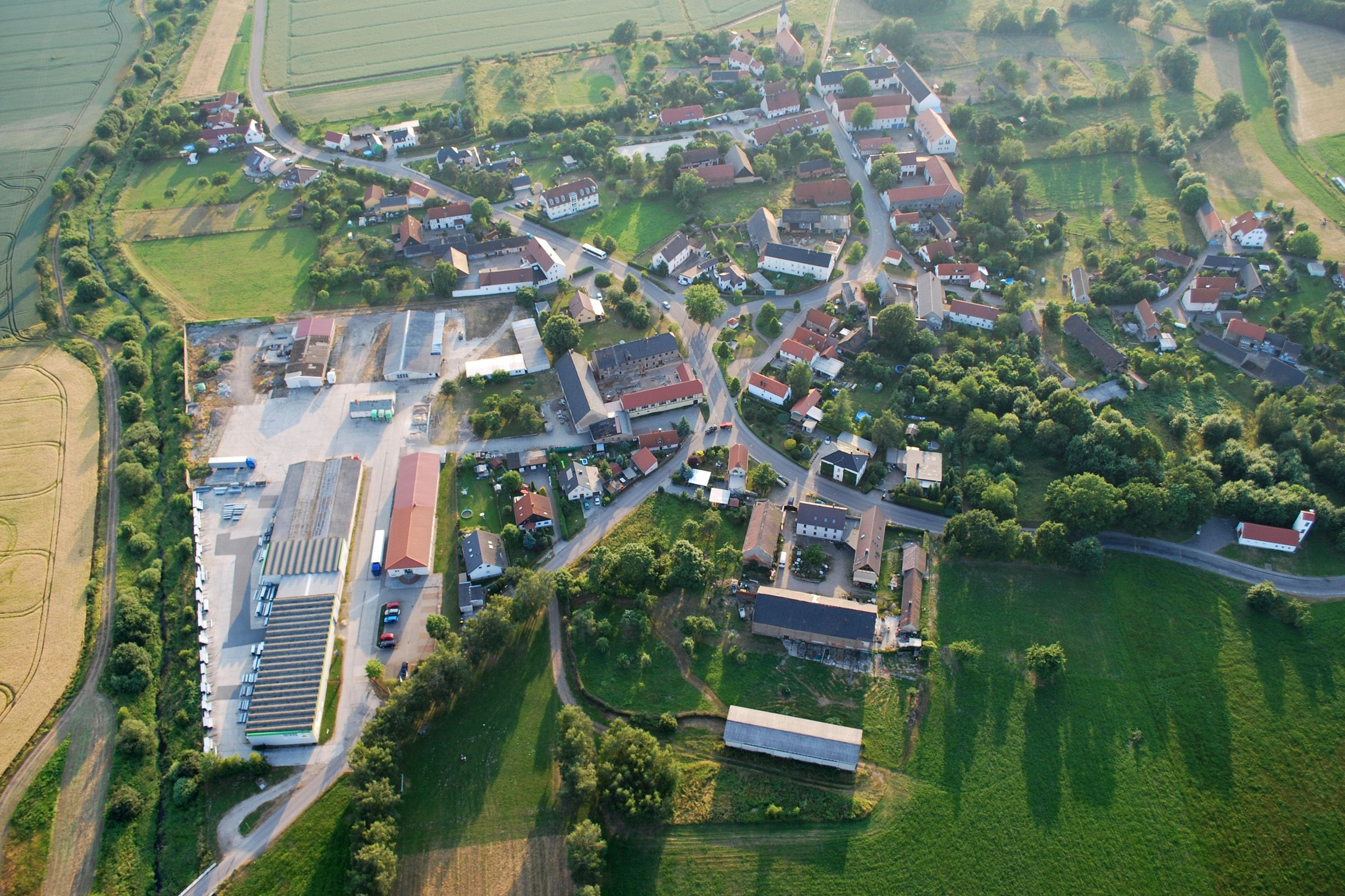 Luftaufnahme von Großpötzschau von Heißluftballon aus